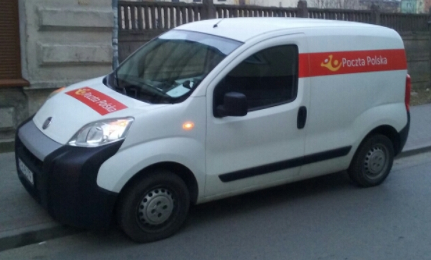 Samochód Poczty Polskiej w 60-tysięcznym Tomaszowie Mazowieckim